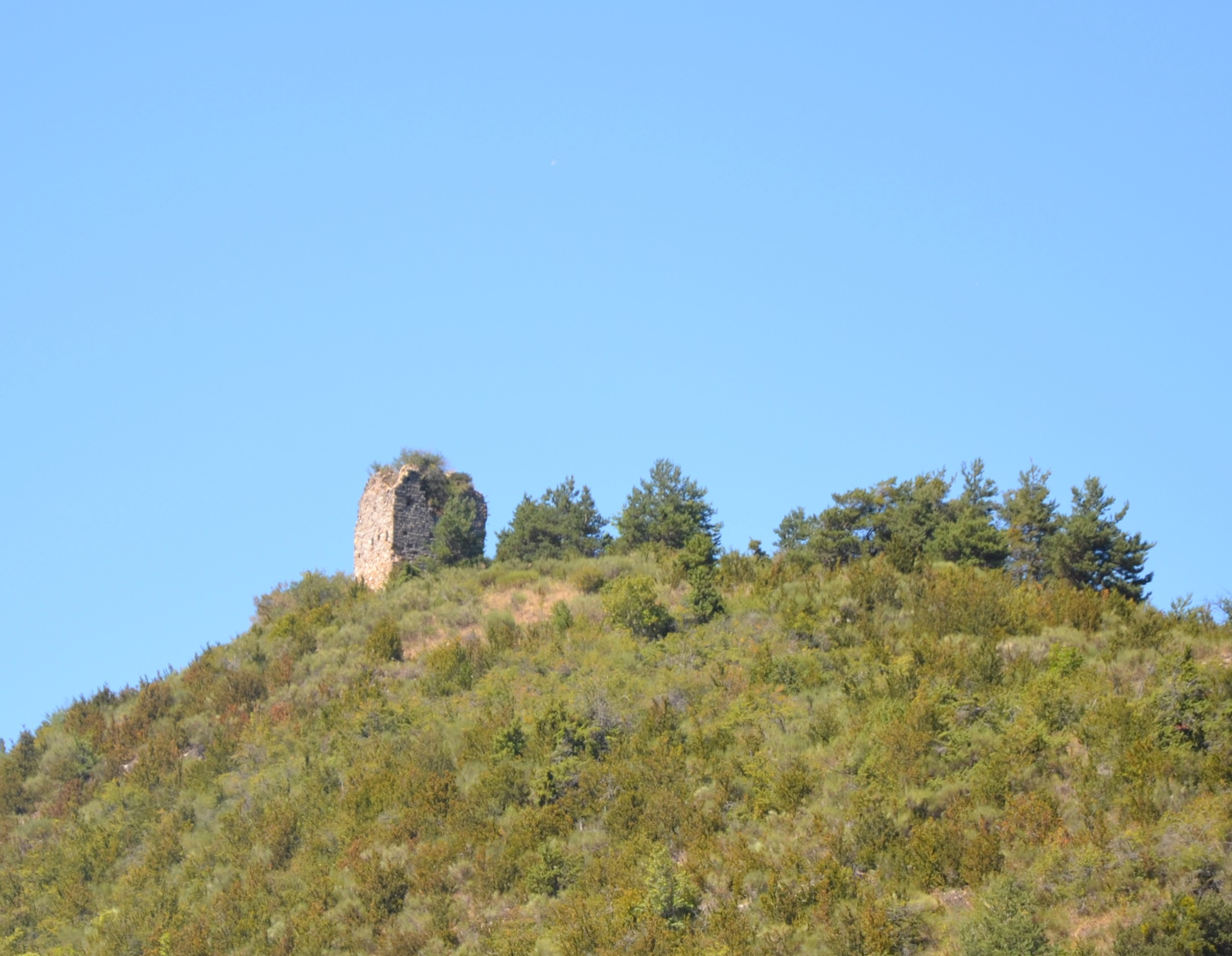 Donjon à Chauvac